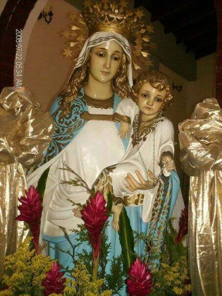 Viergen de la Candelaria